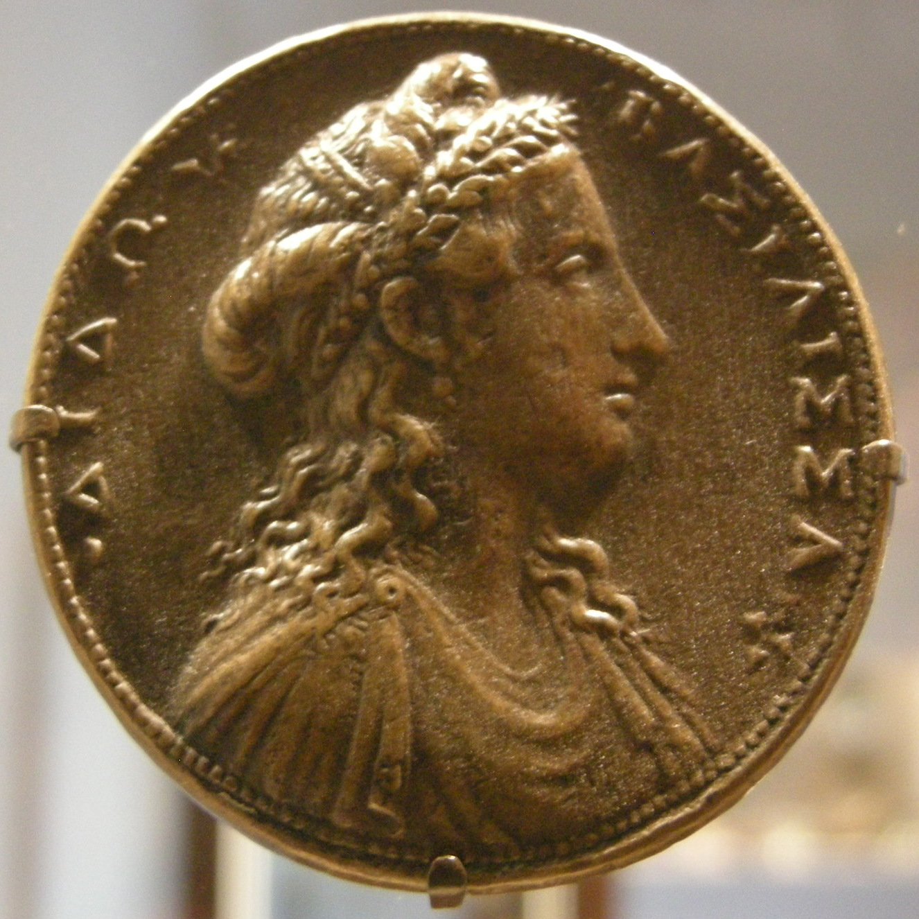 Alessandro cesati, didone, regina di cartagine, 1550 circa